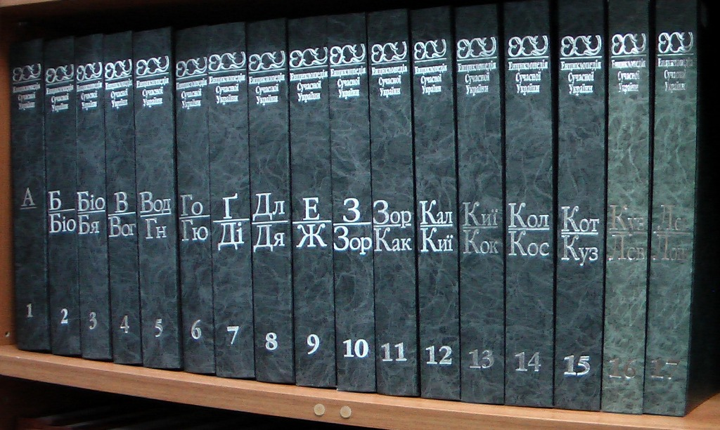 Енциклопедії сучасної України (2017 рік)